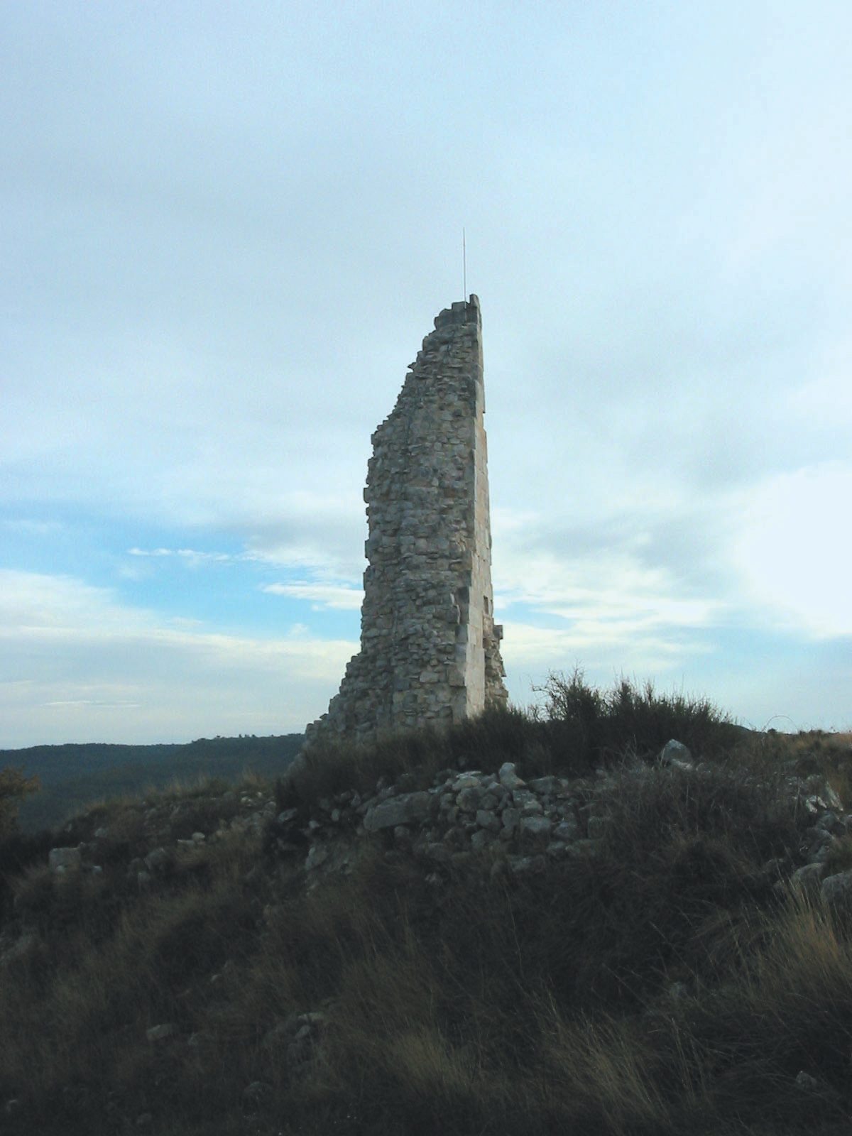 Site de la Quille, au Puy-Sainte-Réparade (Bouches-du-Rhône)